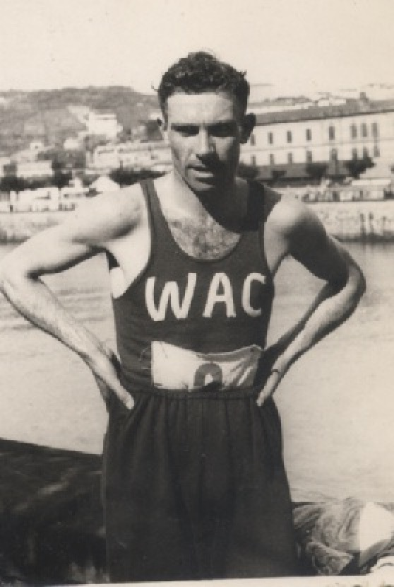 Frans Hermn, Belgisch atleet